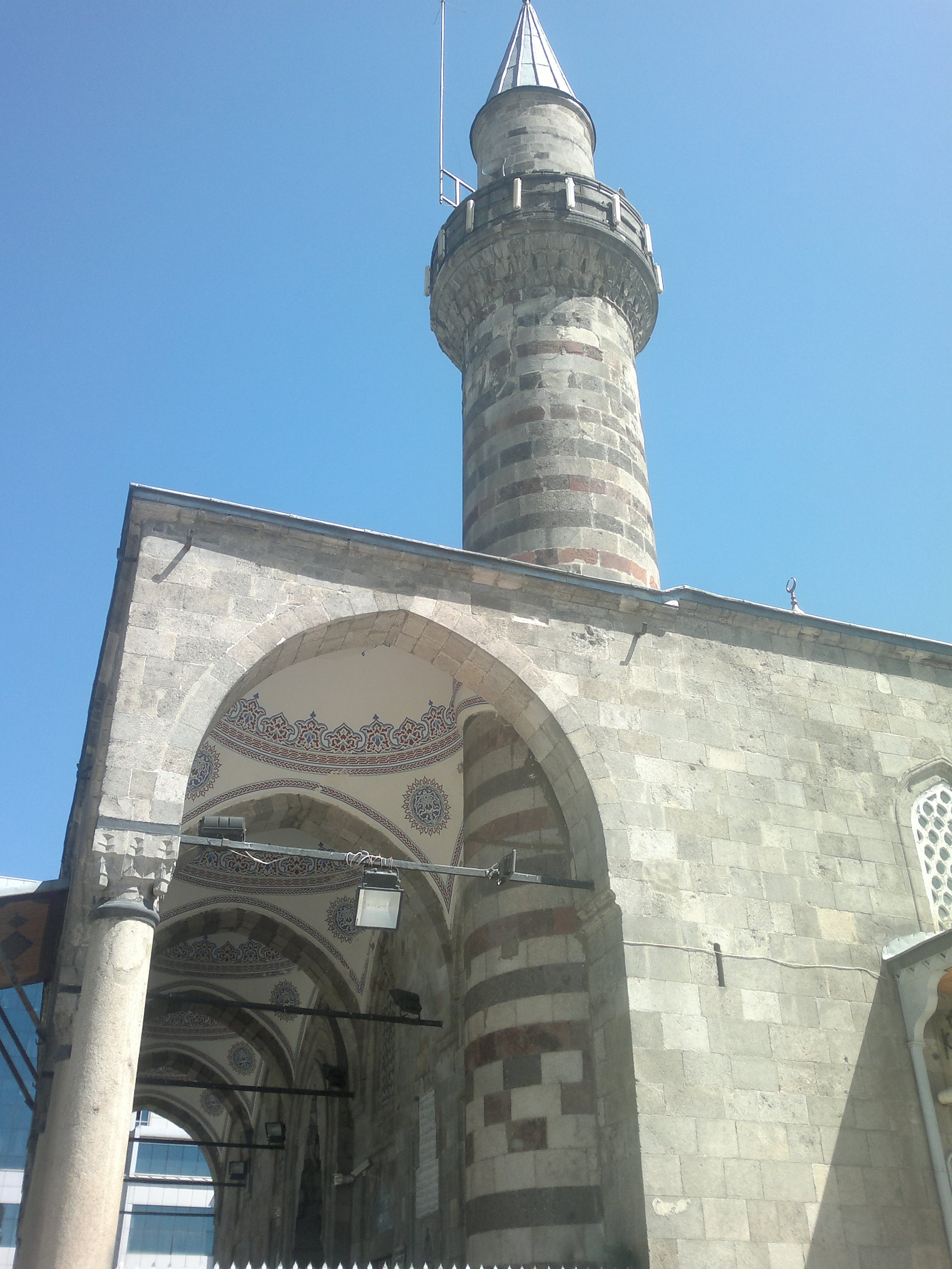 Erzurum Lala Mustafa Paşa Camii, Türkiye'de Erzurum İli merkez ilçesi Yakutiye'de 1562 yılında Lala Mustafa Paşa tarafından yaptırılmış Erzurum ’daki ilk Osmanlı camisidir.